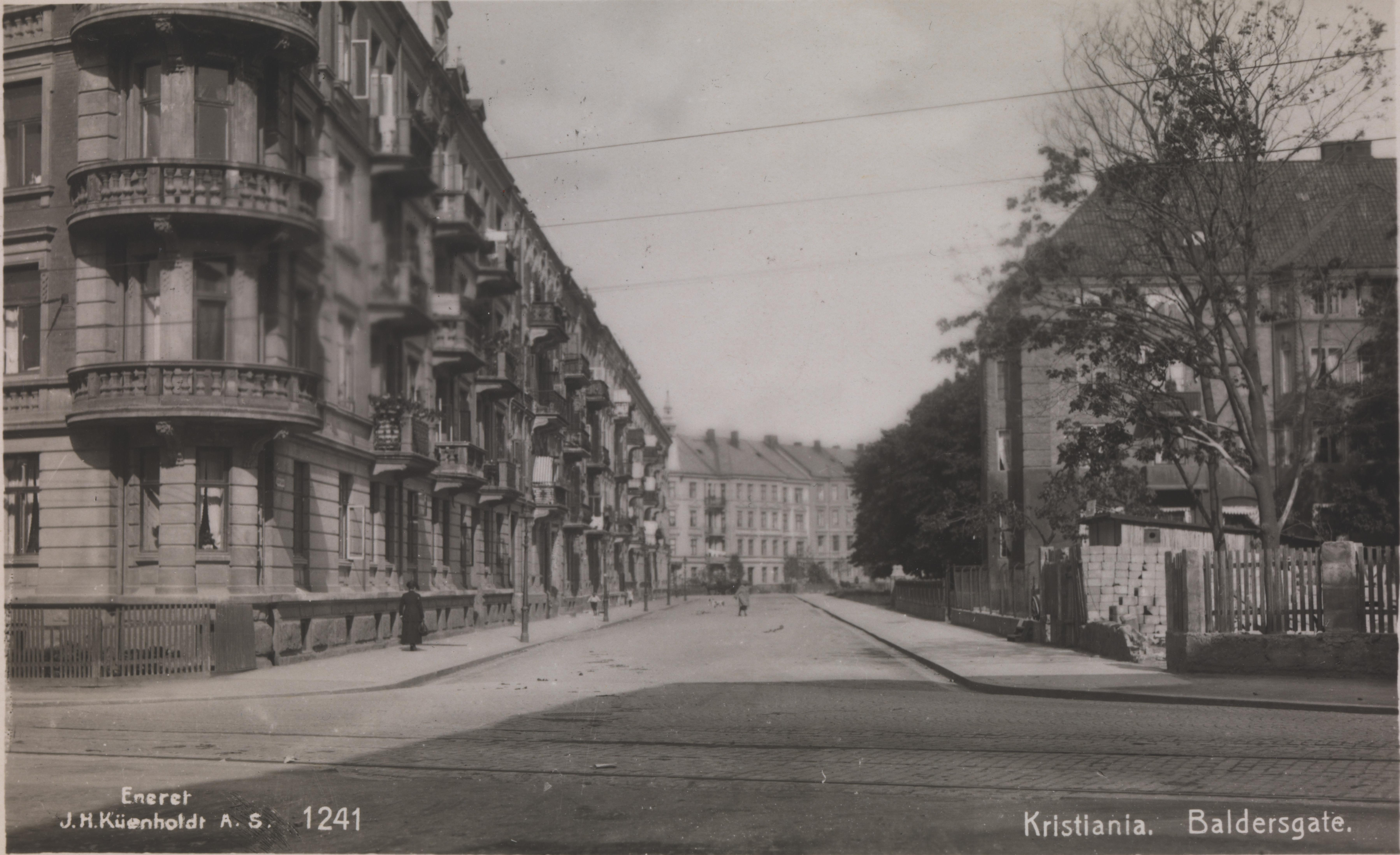 Baldersgate sett fra Frognerveien. Frognerveien nummer 29 til venstre. Bildet er hentet fra Nasjonalbibliotekets bildesamling